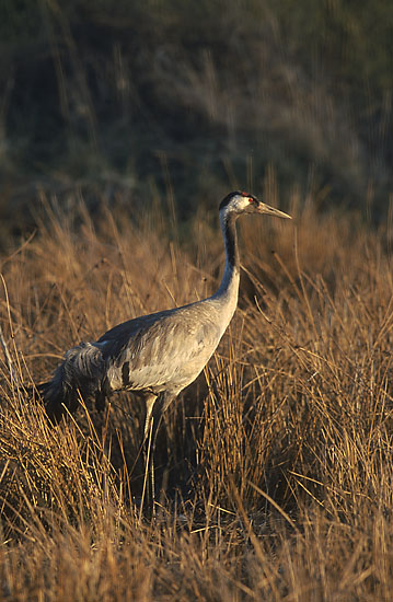 Grus grus